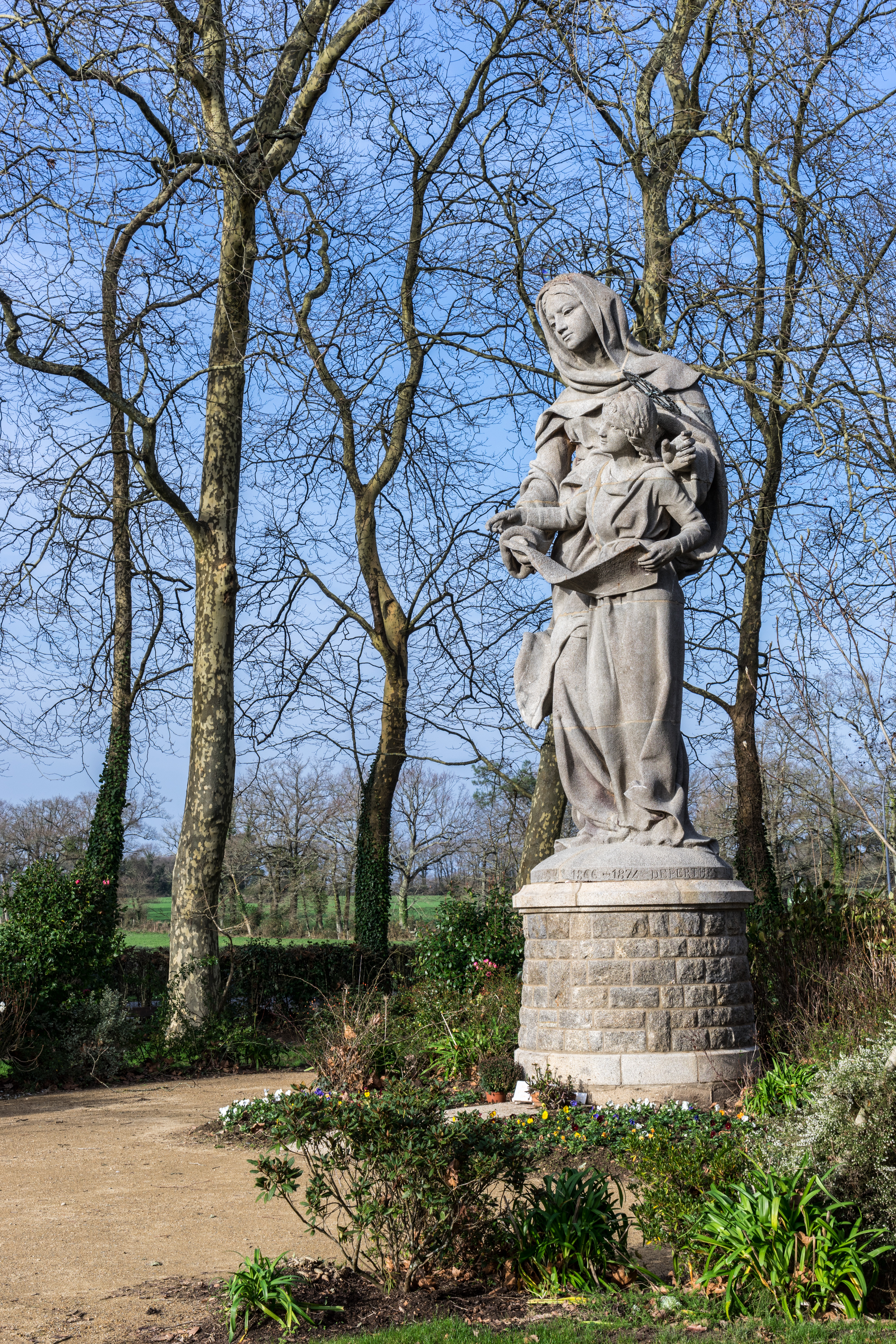 Alexandre Falguière (1831-1900), Sainte Anne et la Vierge, 1874, granit. Praticien : Joseph Marie Le Goff (1832-1890). Parc de la basilique Sainte-Anne d'Auray.